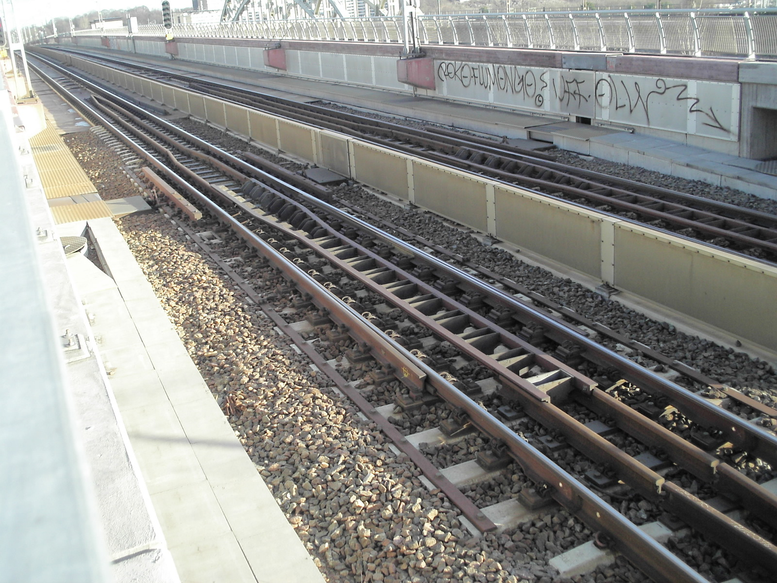 EN: Expansion joint on the Årstabron rail bridge in Stockholm -- SV: Expansionsskarv på västra Årstabron i Stockholm